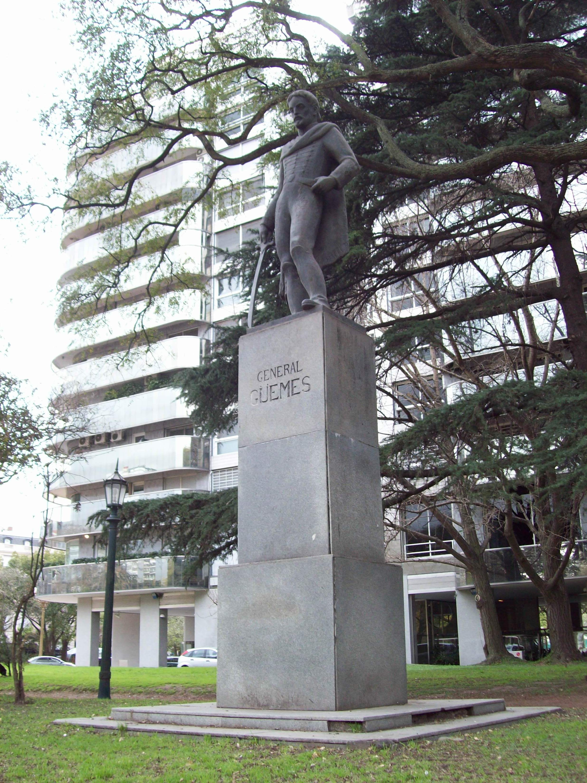 Monumento al General Guemes en Plaza Chile, Buenos Aires, Obra de Mario Huigulti